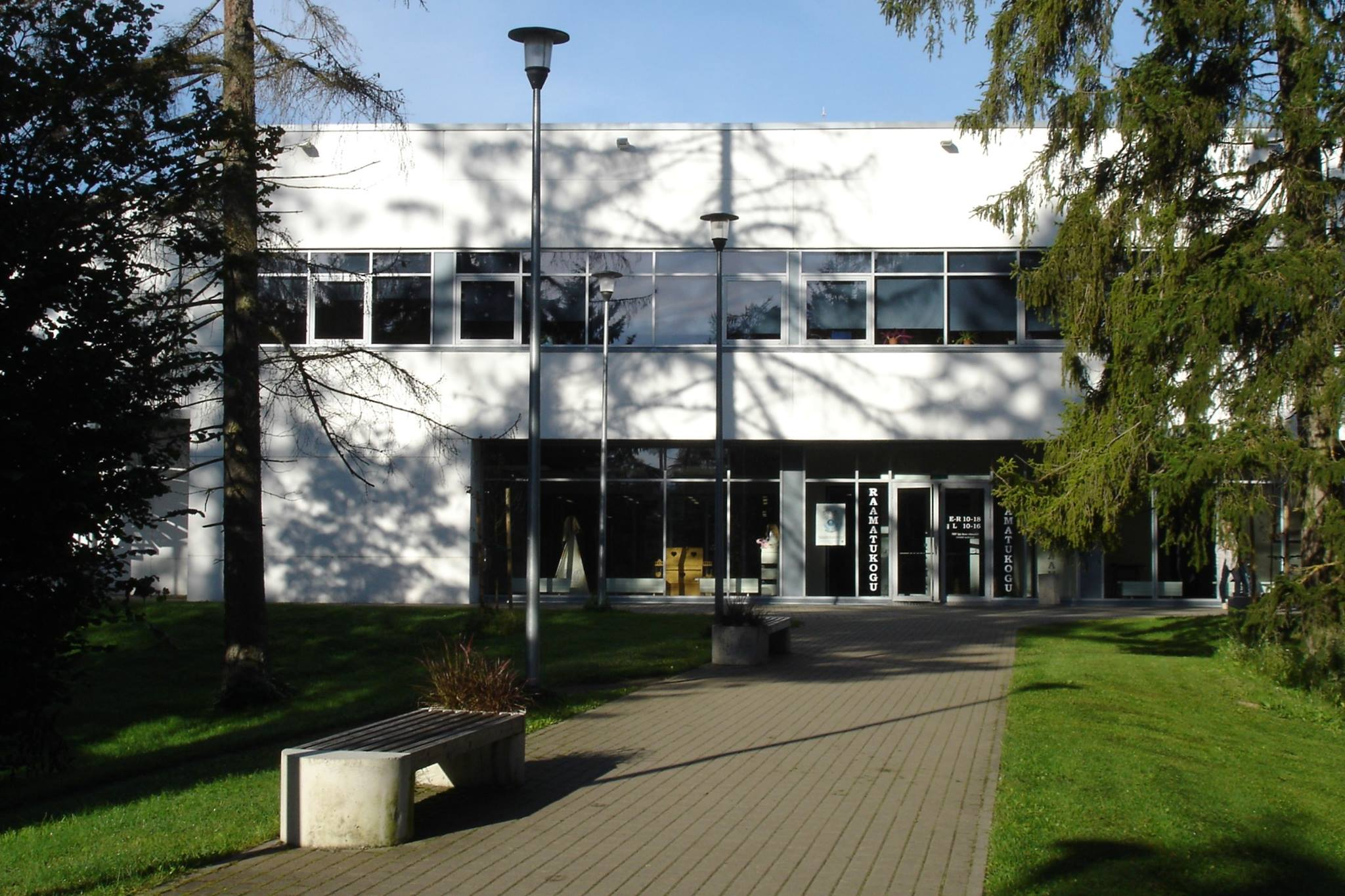 Harju Maakonnaraamatukogu